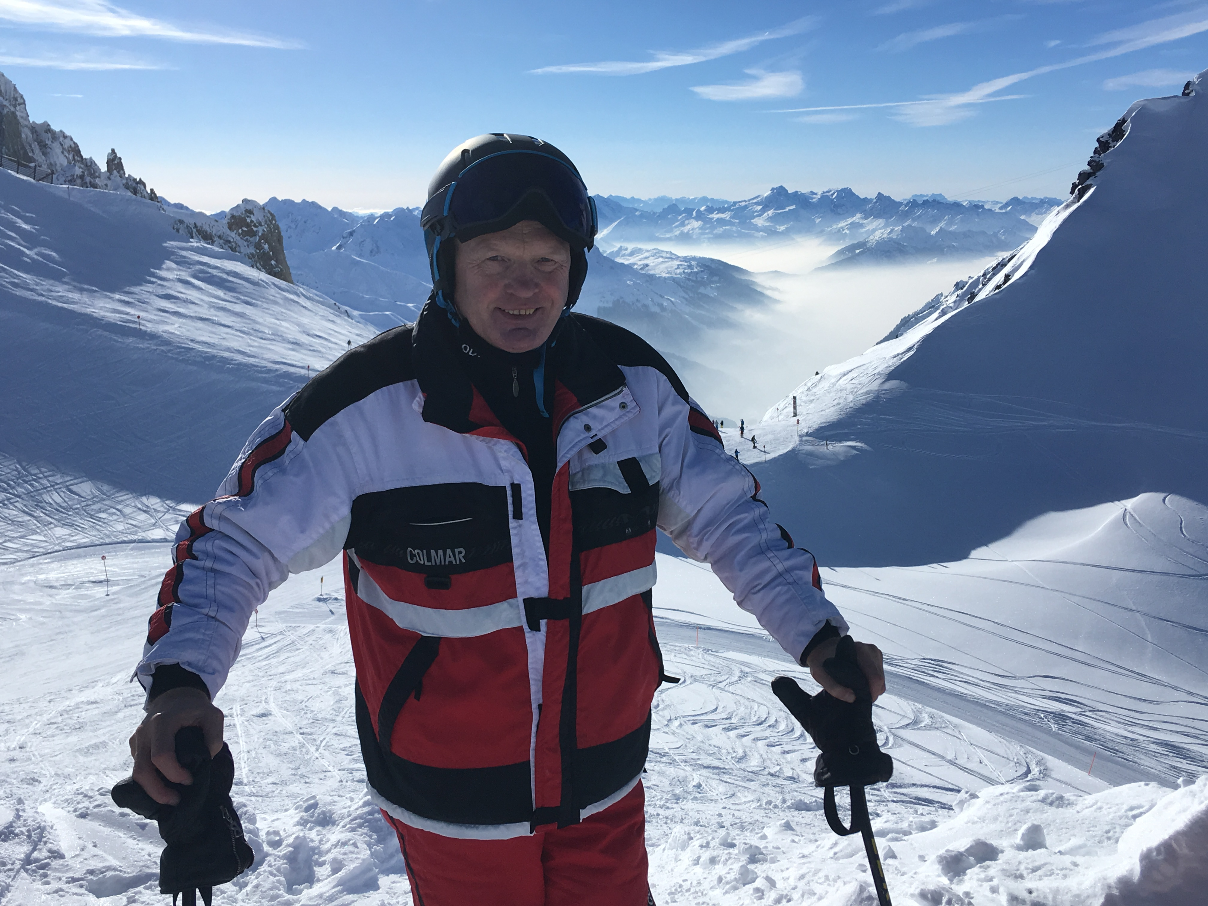 Prof. Dr. Josef Kloppenburg am Arlberg 2018